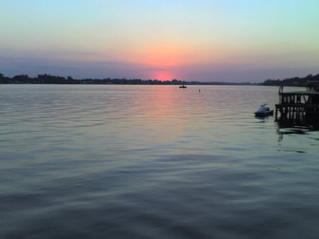 A sunset, Aberystwyth